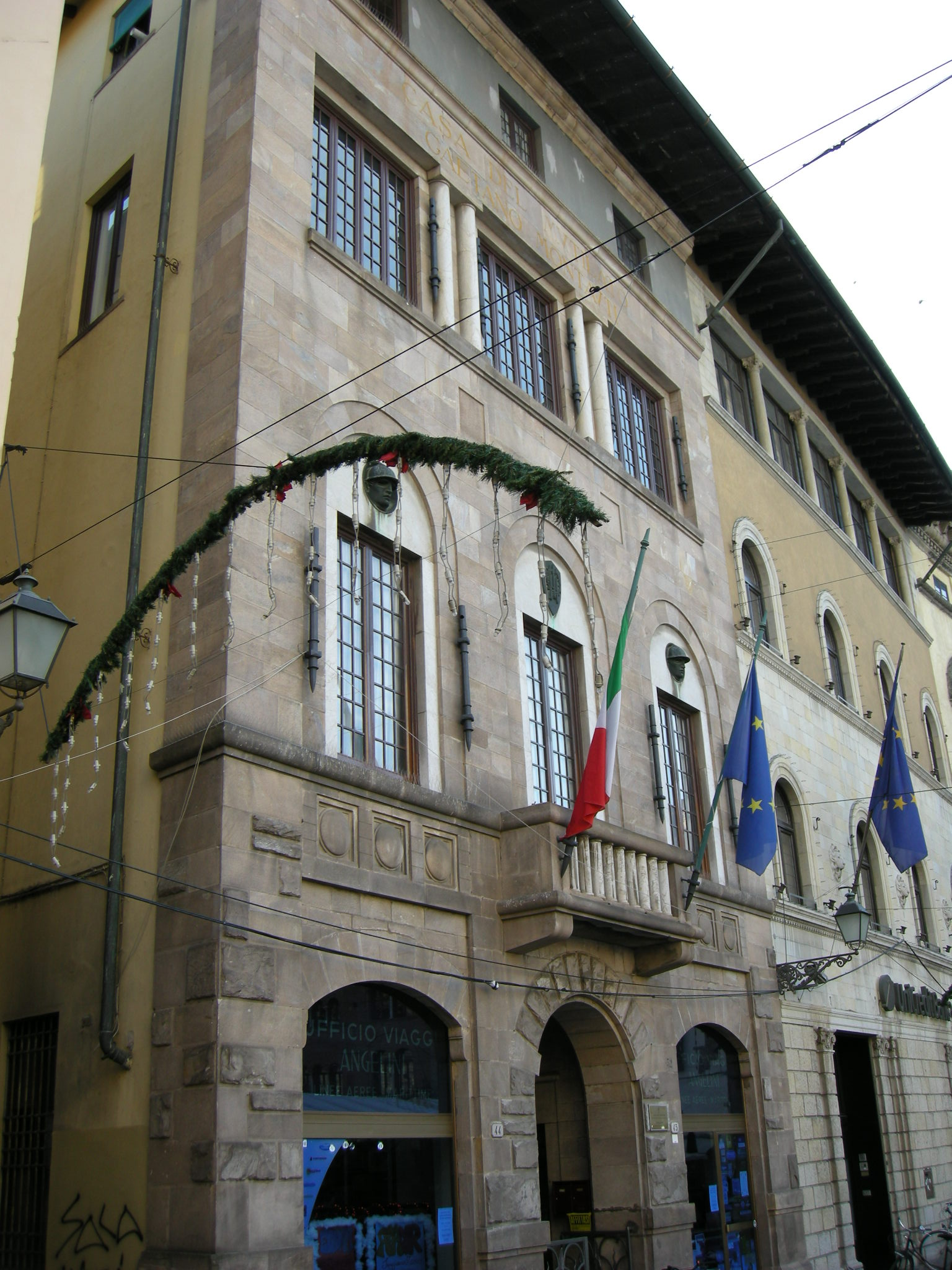 Casa del Mutilato (Lucca) 01